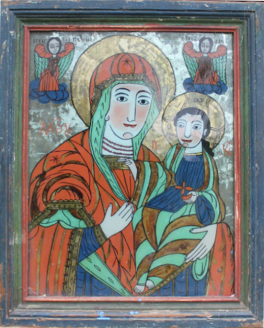 Icoană de la biserica de lemn din Măleni, județul Sălaj.